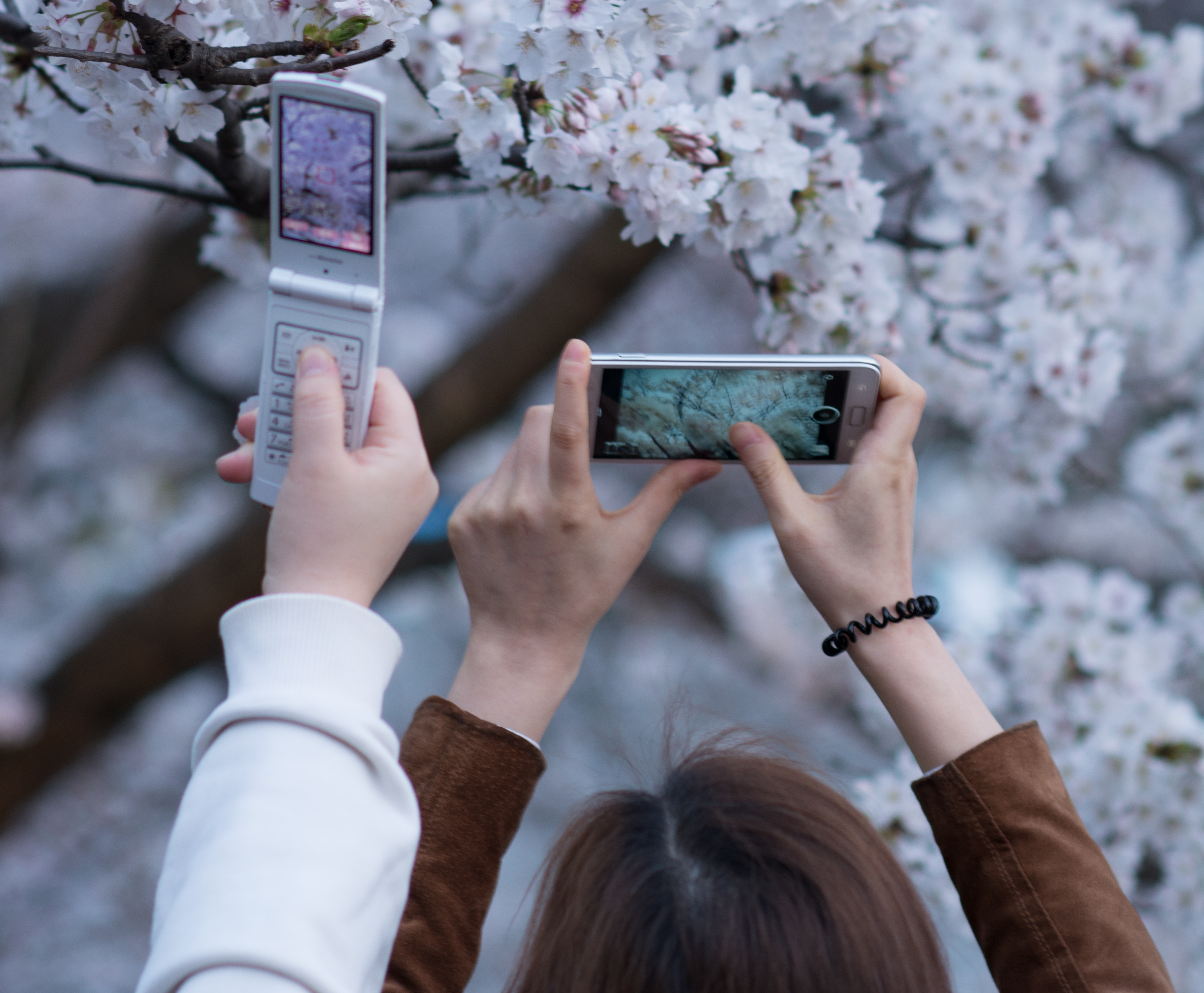 Un cellulare tradizionale e uno smartphone